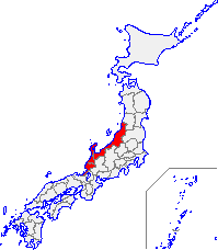 北陸地方の位置（4県）